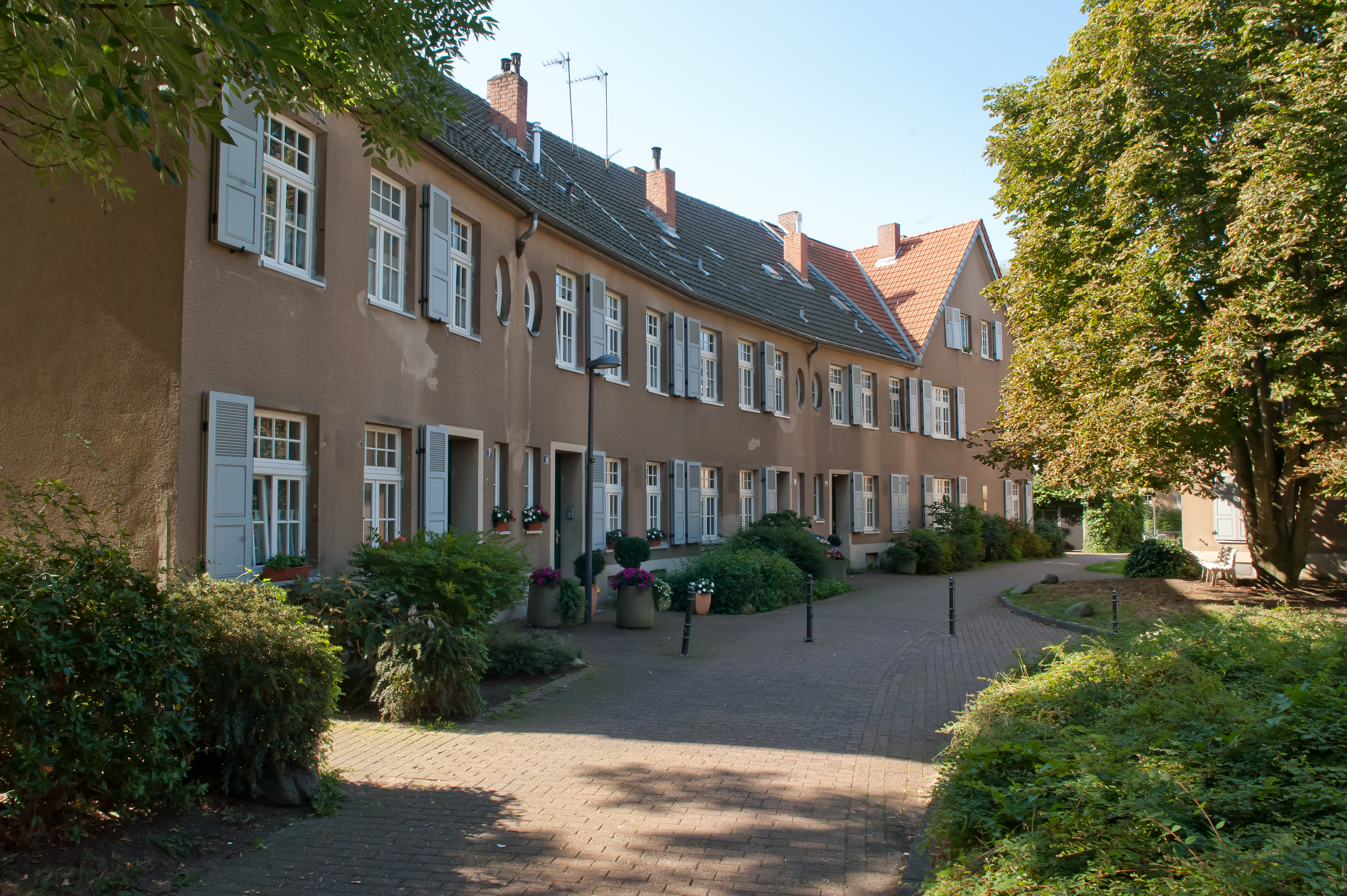 Siedlung der Ehrenfelder Arbeiterwohnungsgenossenschaft. Aufnahme entstand wenige Tage vor dem Grossbrand der einen Teil der Dächer zerstört hat.This is a photograph of an architectural monument.